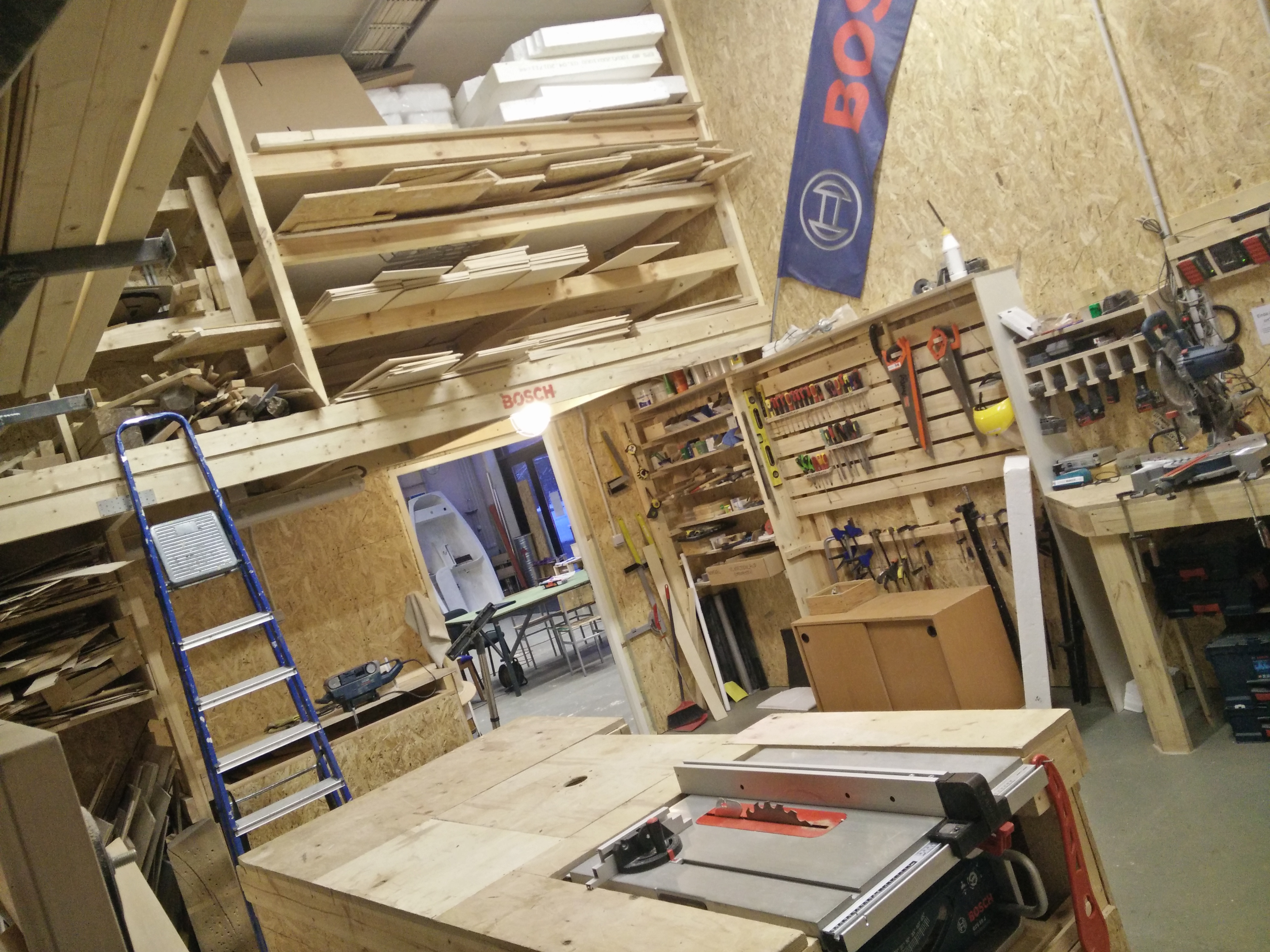 Puidutöökoda